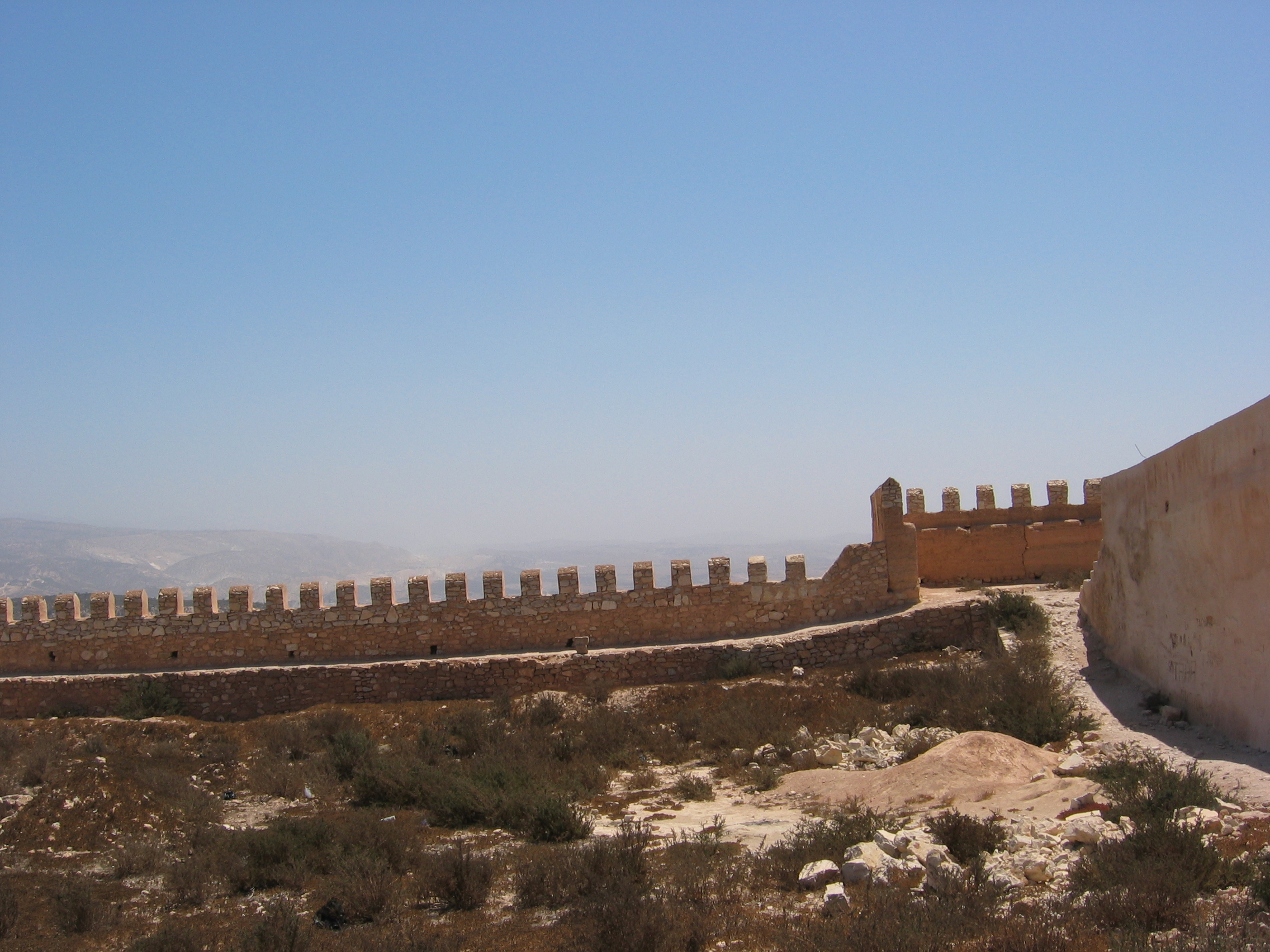 Agadir (Maroc), ruines de l'ancienne Kasbah